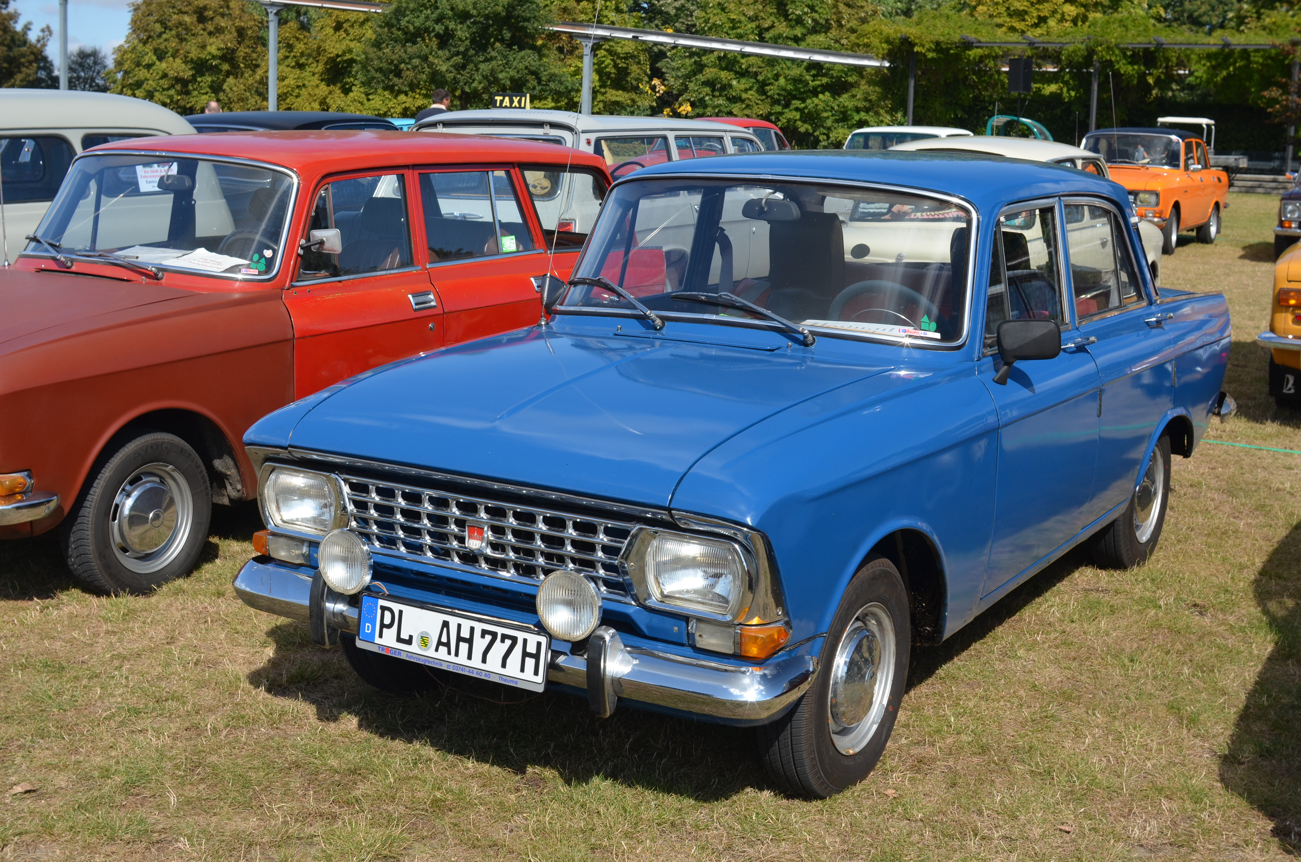 Moskwitch